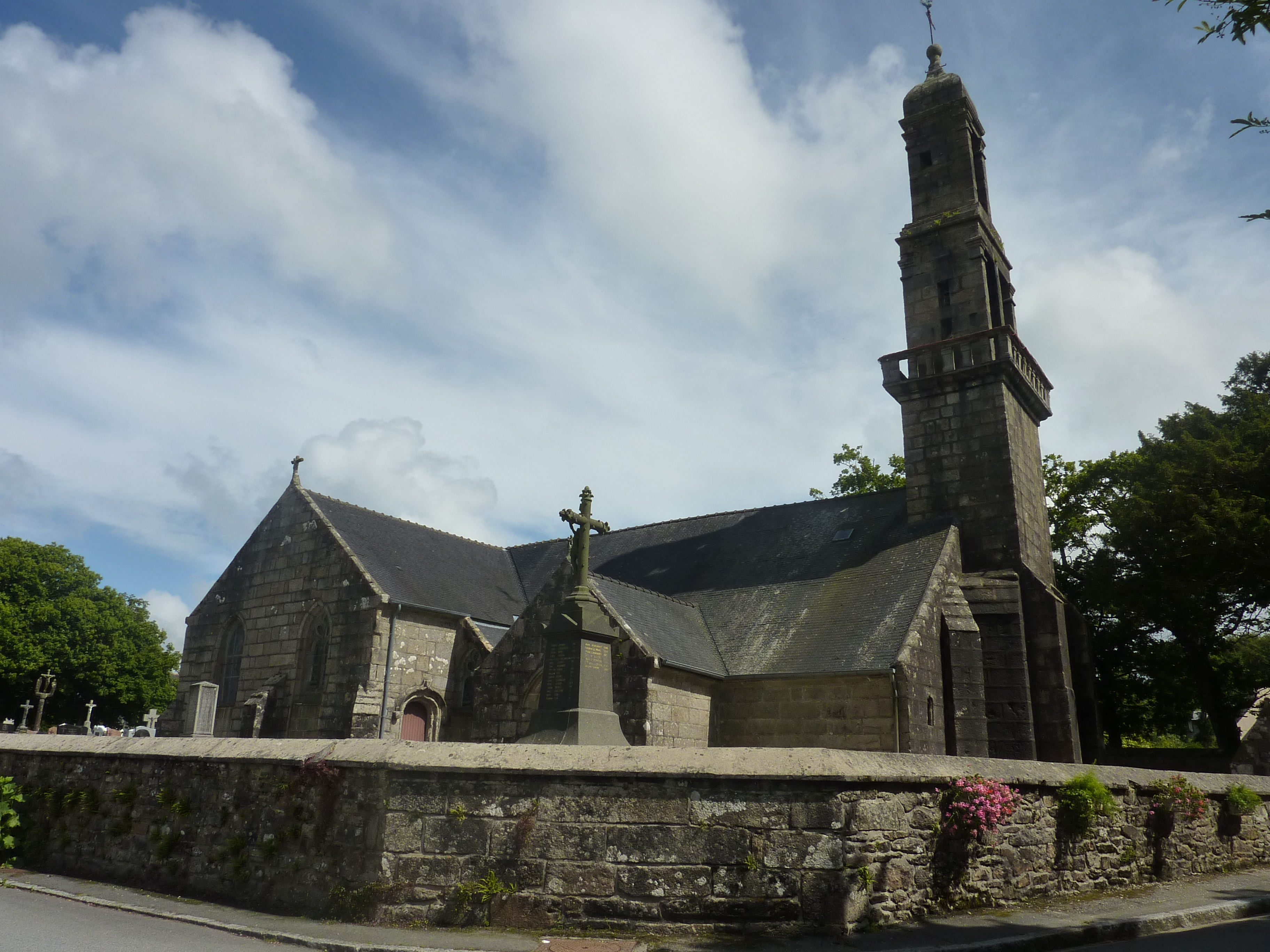 Eglise paroissiale de Saint-Divy (Finistère)